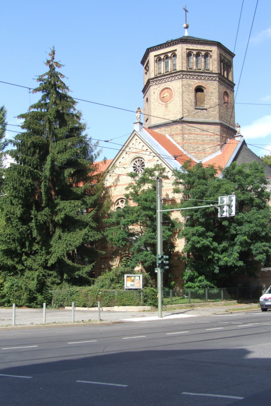 Dorfkirche in Berlin-Niederschönhausen (Friedenskirche) Fotograf: Harald Rossa Datum: August 2006 Höher aufgelöste Version ist verfügbar